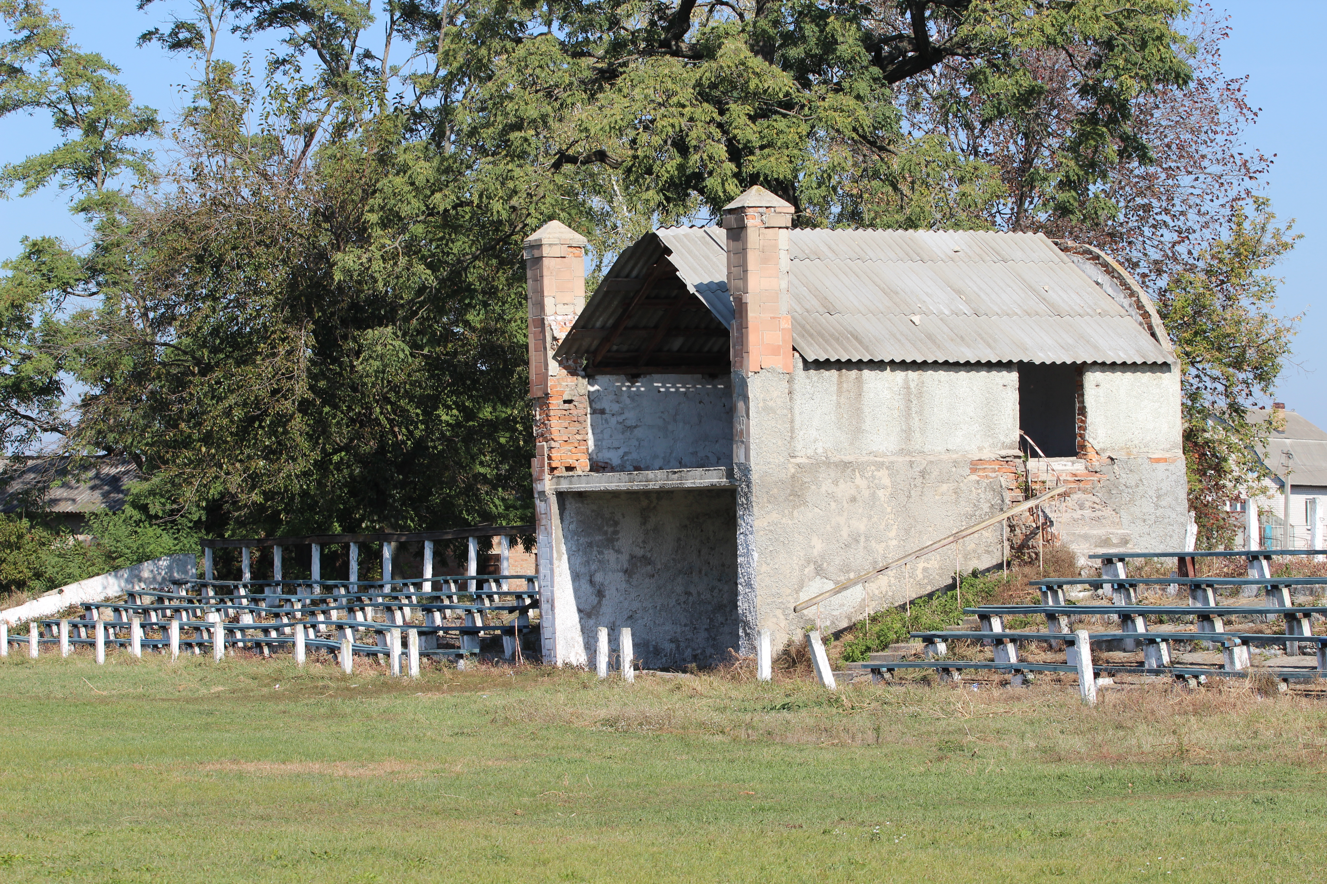 Стадіон (зміш.), с. Чапаївка